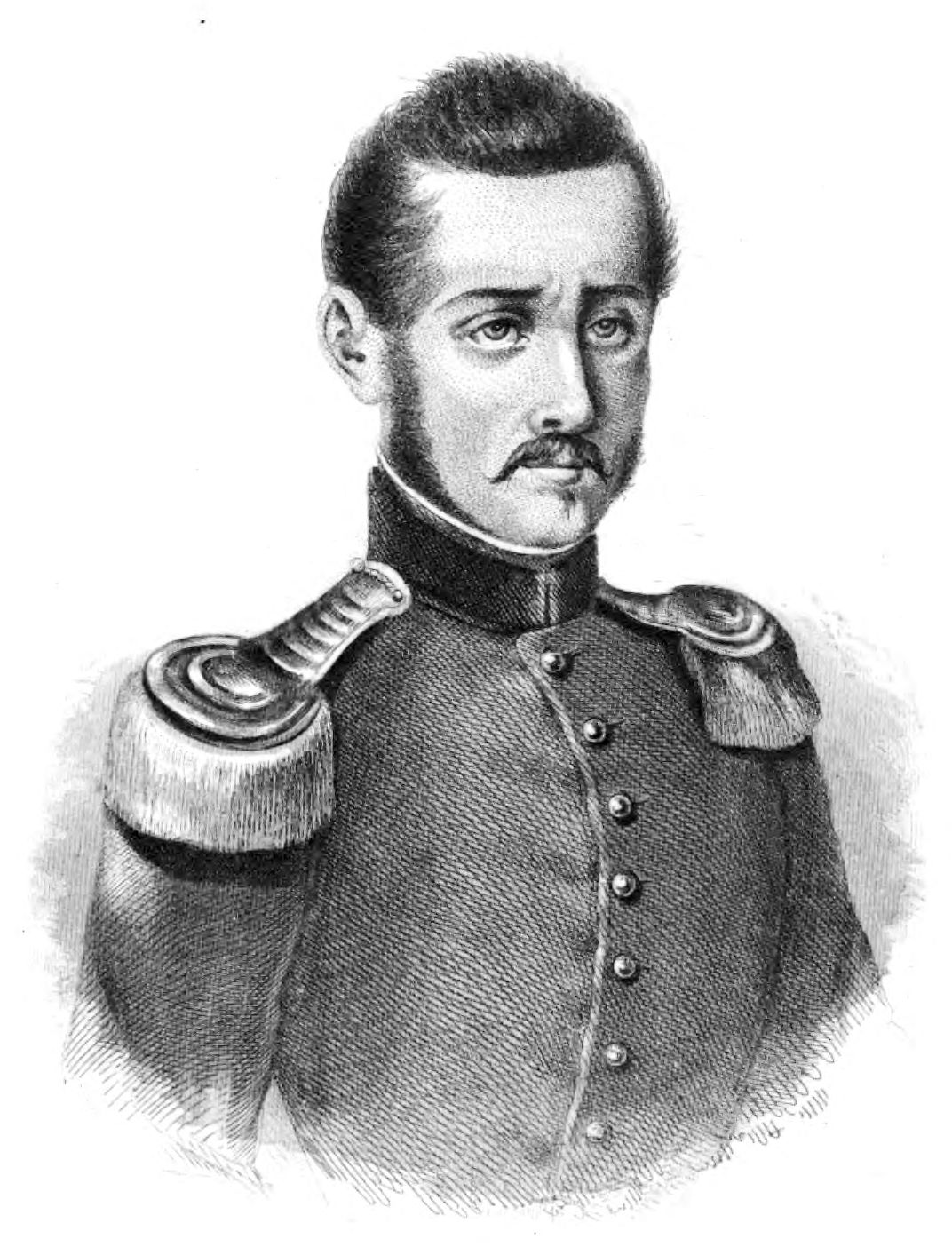 Efisio Tola (Sassari, 1803 – Chambéry, 12 giugno 1833)